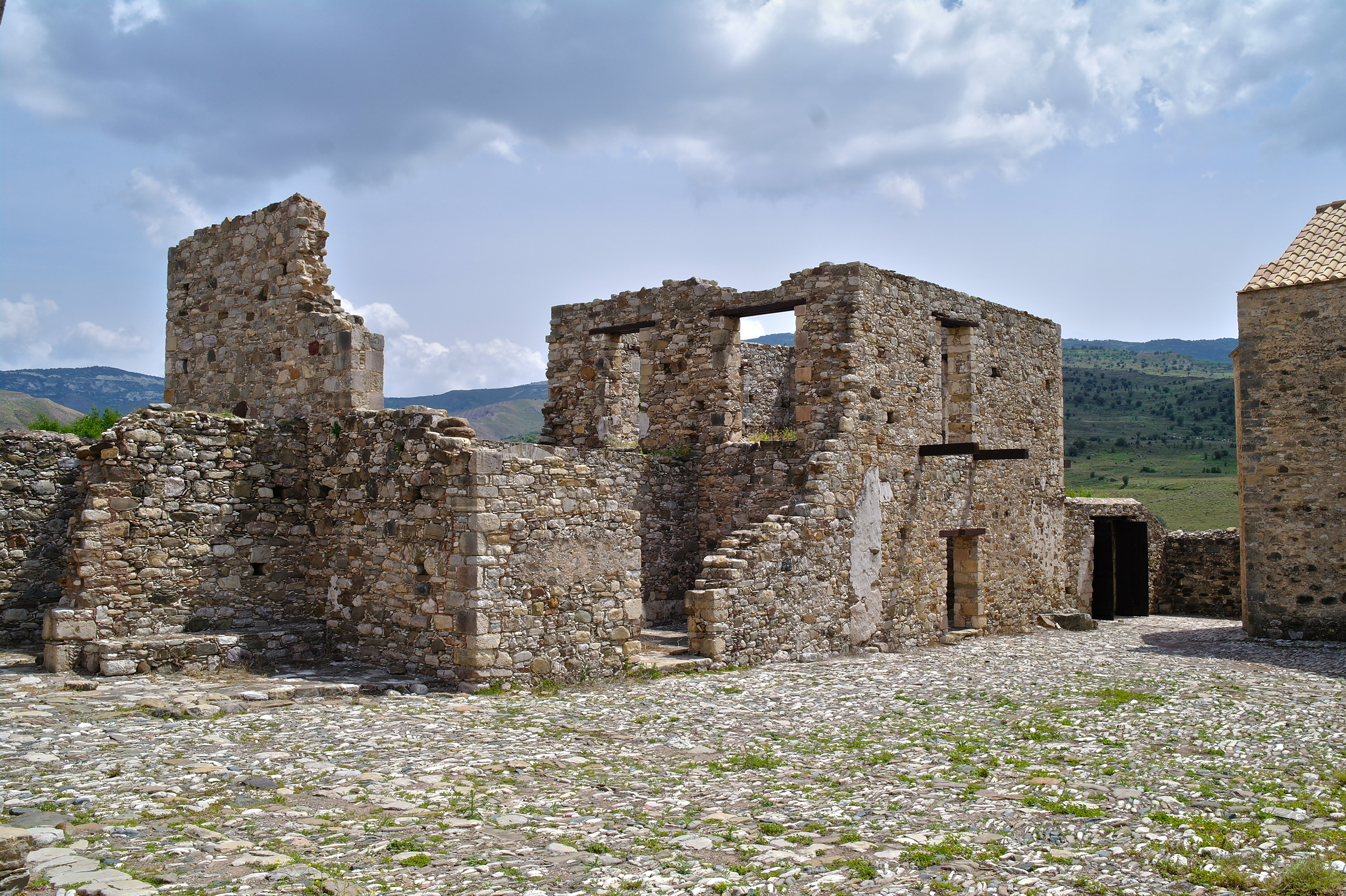 Cours intérieure du monastère Panagia Tou Sini situé dans le district de Paphos à Chypre